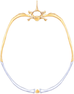 Нормальная форма грудной клетки (вид со стороны хвоста). Сиамский/ориентальный типы тела. Это правая часть рисунка